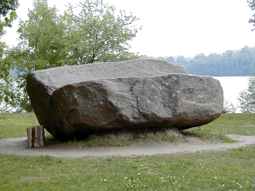 Lielvārde, akmens "Lāčplēša gulta" 2000-05-20